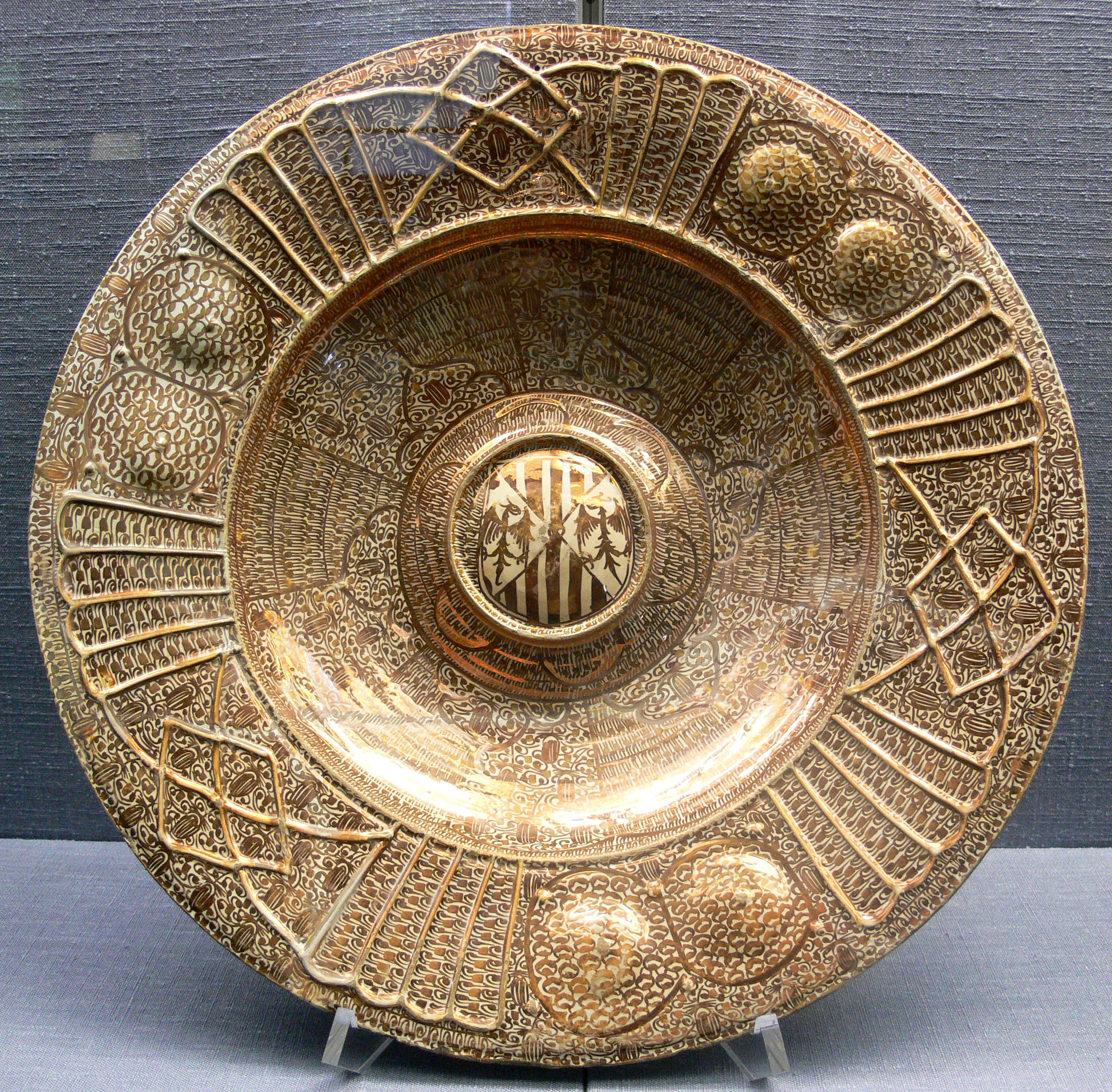 Schüssel mit dem Wappen des Königreichs Sizilien und mit Relief-Dekor; Valencia, Anfang 16. Jh. Kunstgewerbemuseum Berlin, Inv. Nr. K 1682